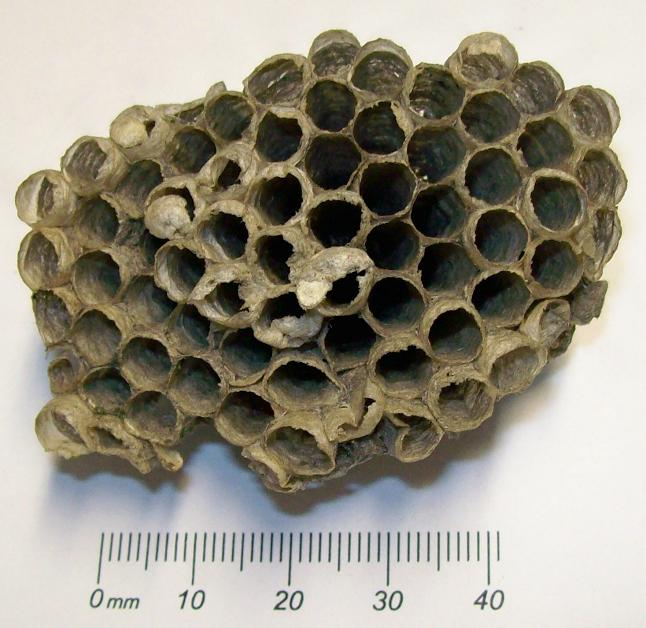 Wabe einer Wespenkolonie